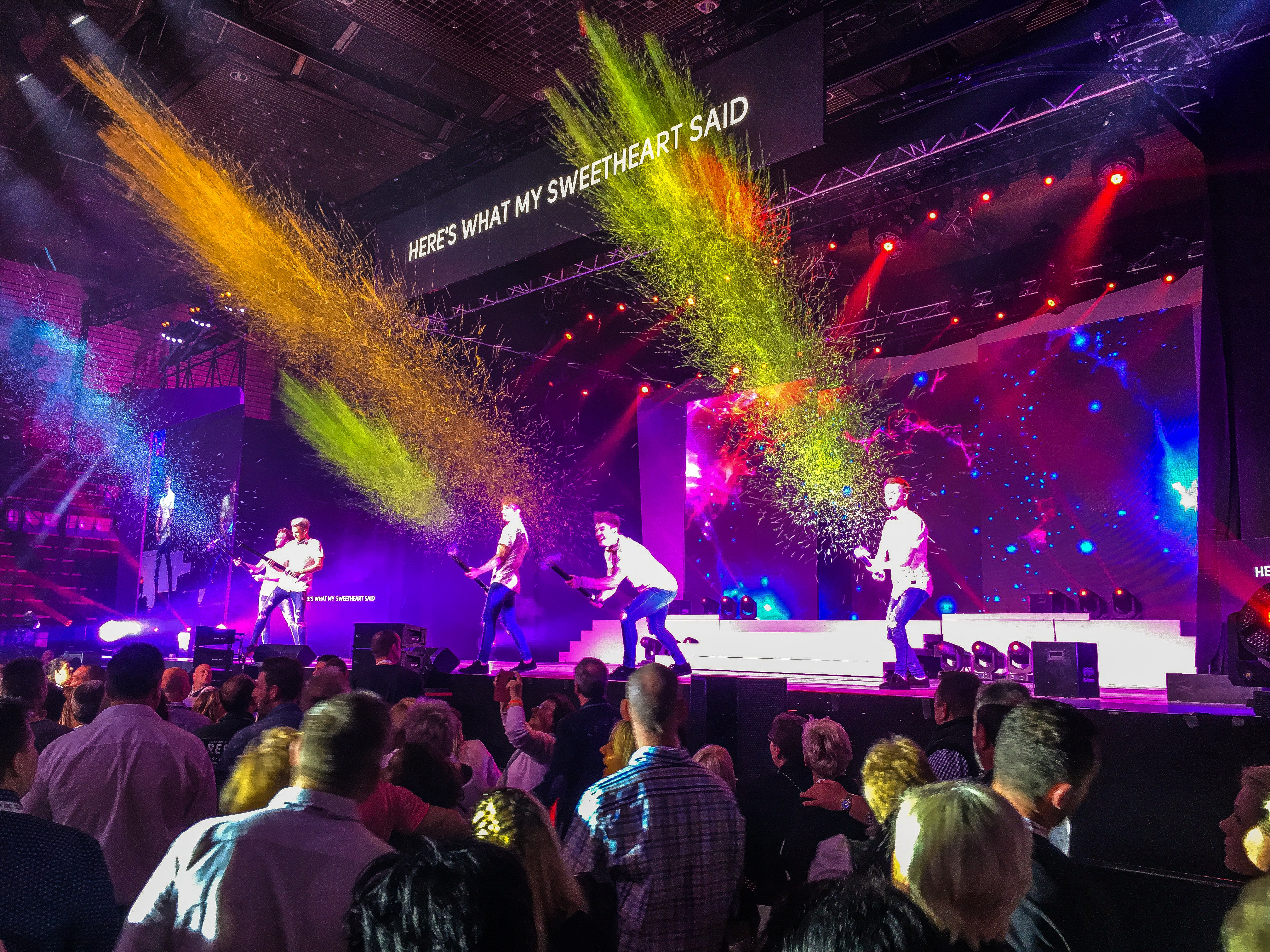 DDC schießt Confetti